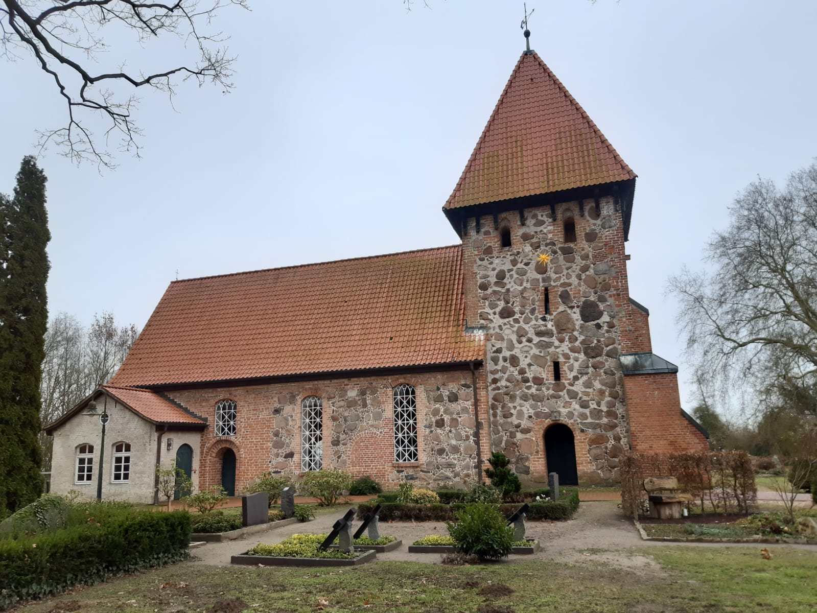 Hier sieht man die Kirche von Satemin von Außen